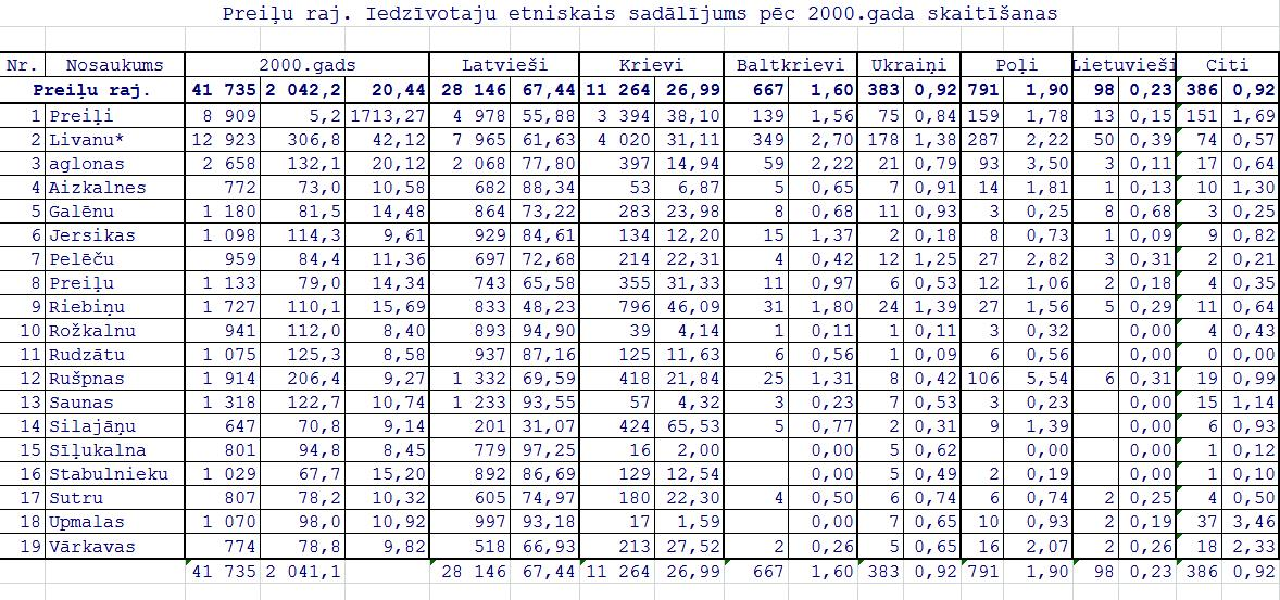 результаты переписи населения Латвии ни 01.04.2000